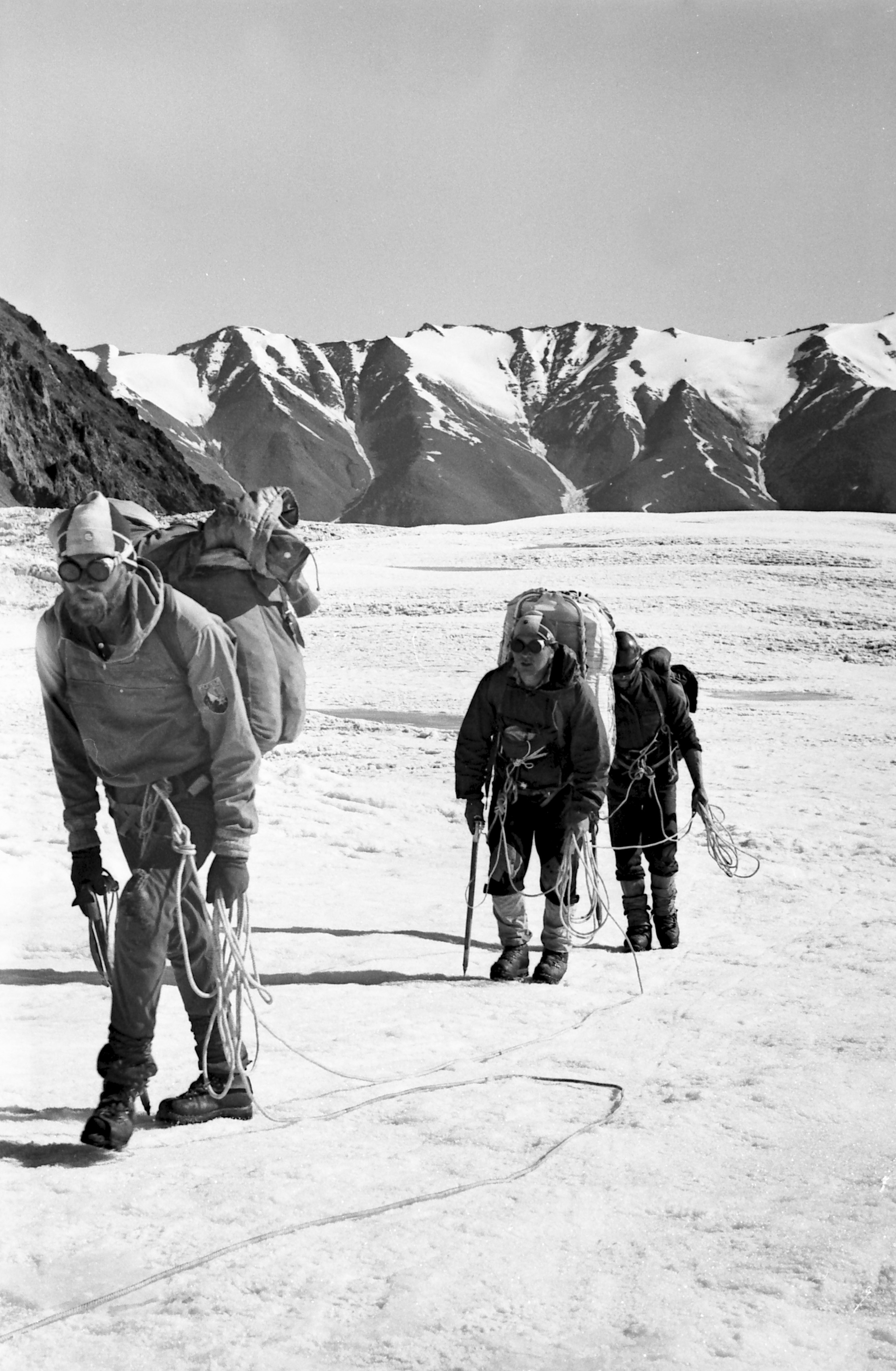 Ekspeditsioon mäetipule "Tartu Ülikool 350".